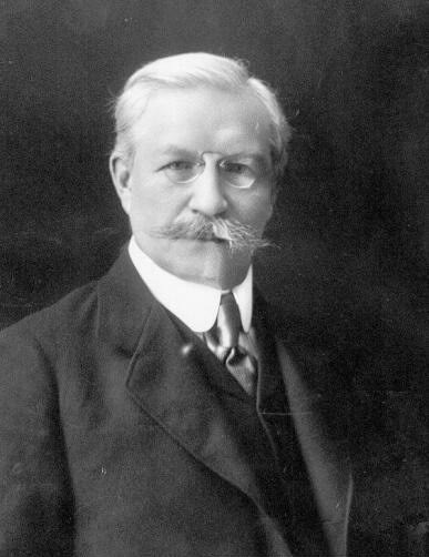 Pavel Milyukov, político ruso.